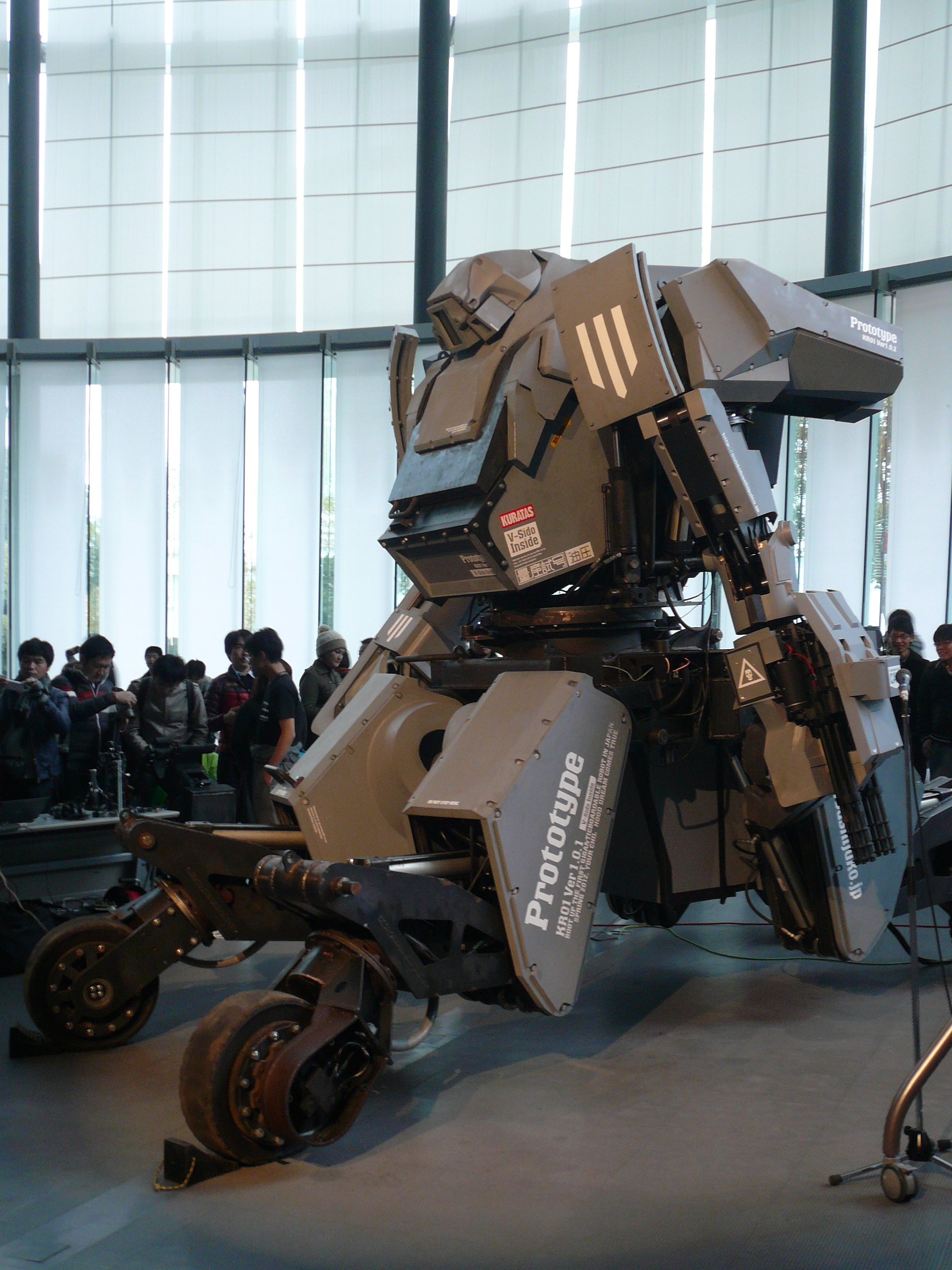 クラタス・Maker Faire Tokyo 2012